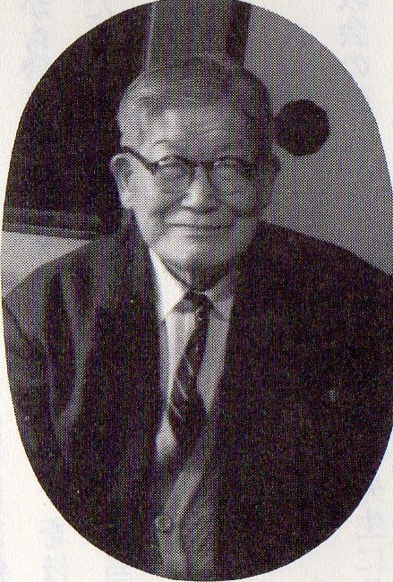 前橋キリスト教会牧師舟喜麟一